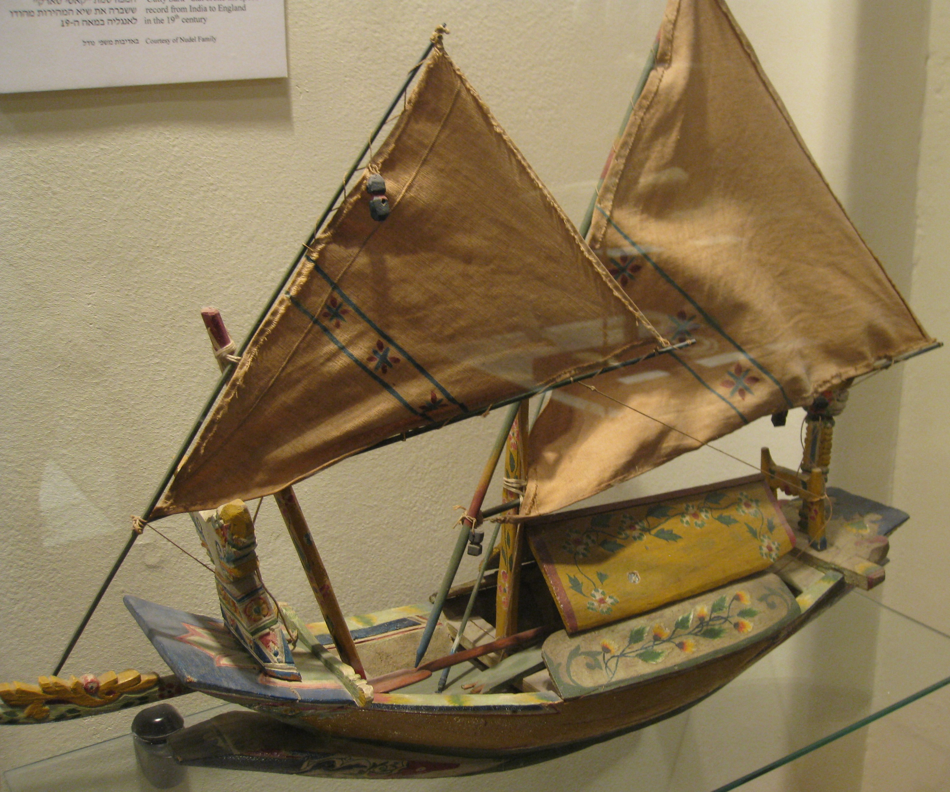 National Maritime Museum, Israel - Ship Models A model of a cargo boat ("Parao") from Indonesia, mid 20th century. coloured wood and canvas המוזיאון הימי הלאומי בחיפה דגמי ספינות דגם של ספינת מטען ותחבורה מסוג "פראו", אינדונזיה, אמצע המאה ה-20. הדגם עשוי עץ צבוע ובד